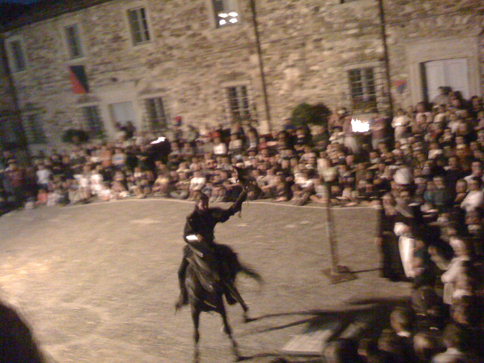 Un momento di spettacolo durante la Festa Medioevale di Monte Cerignone